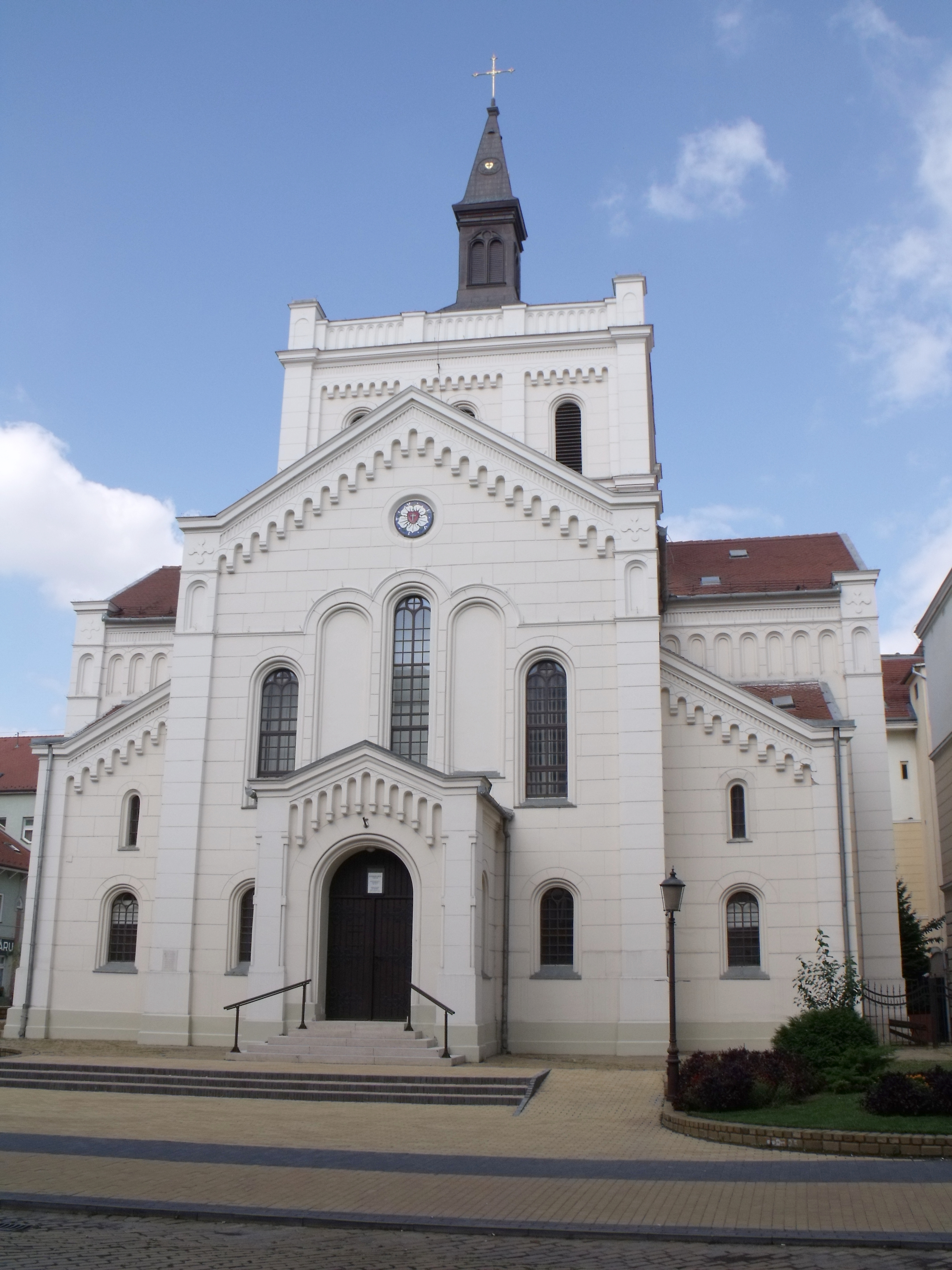 Kecskemét